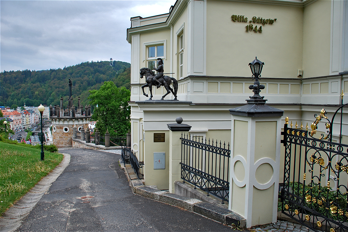 Карловы Вары, Stezka Jeana De Carro 542/5, hotel Lützow